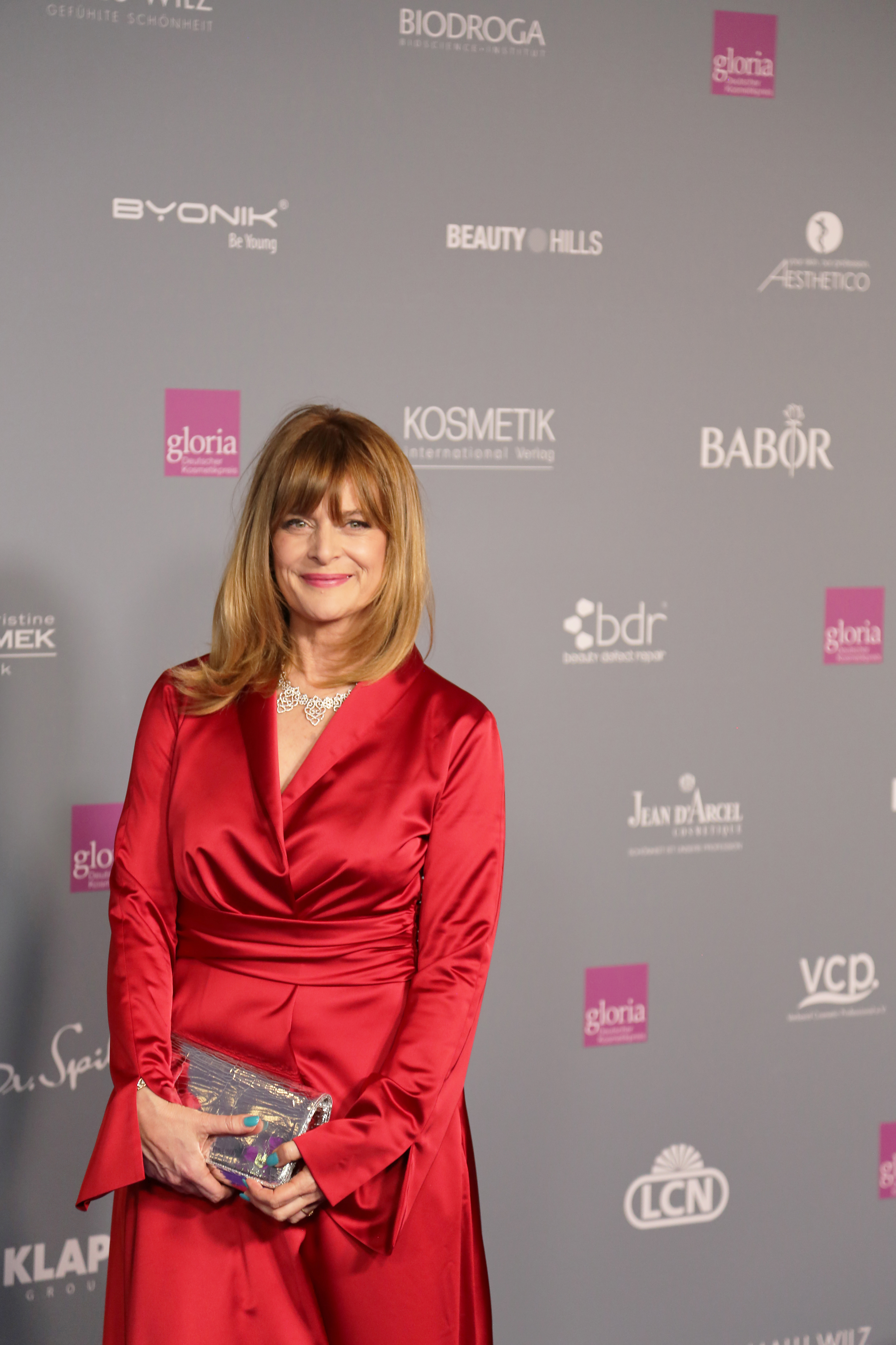 Nastassja Kinski beim "Gloria – Deutscher Kosmetikpreis" am 31. März 2017 im Hilton Hotel Düsseldorf.